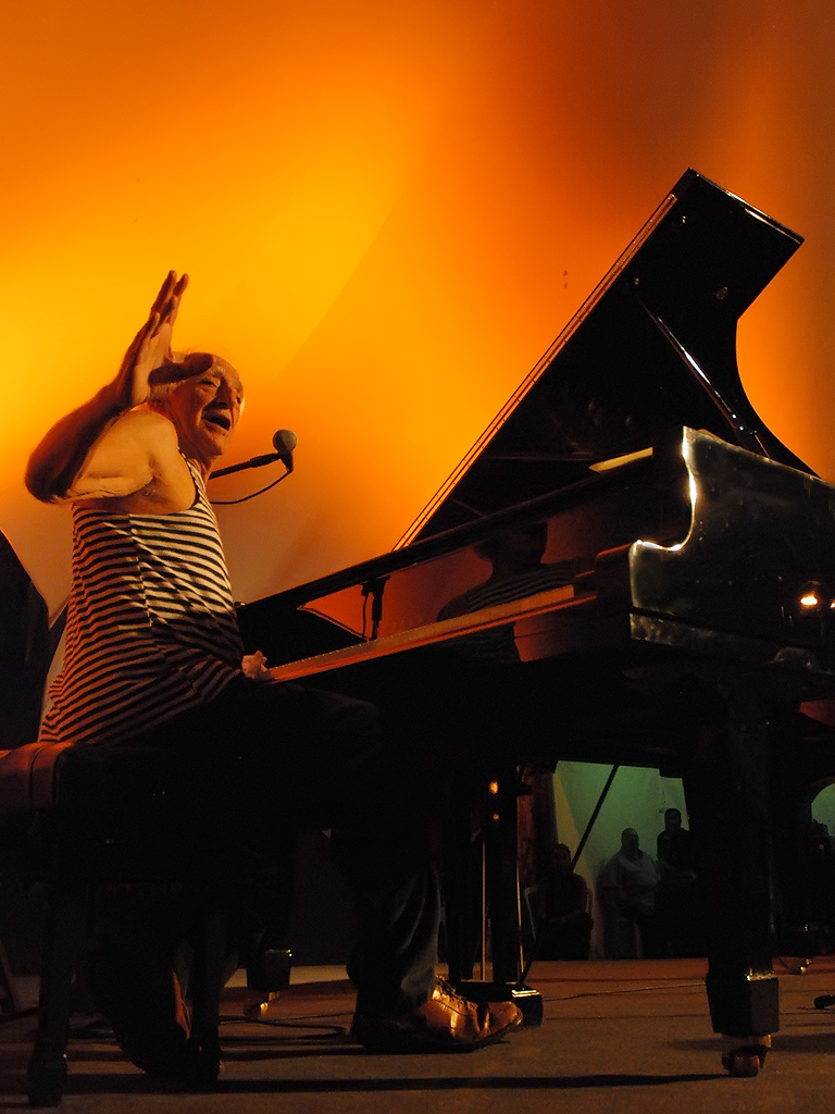 Zé Celso, director from Brazil. Foto: Natalia Bezerra.